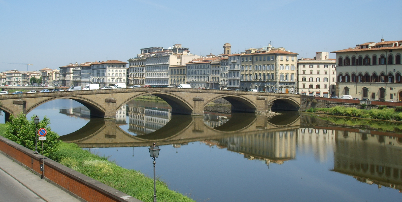 Ponte alla carraia, view